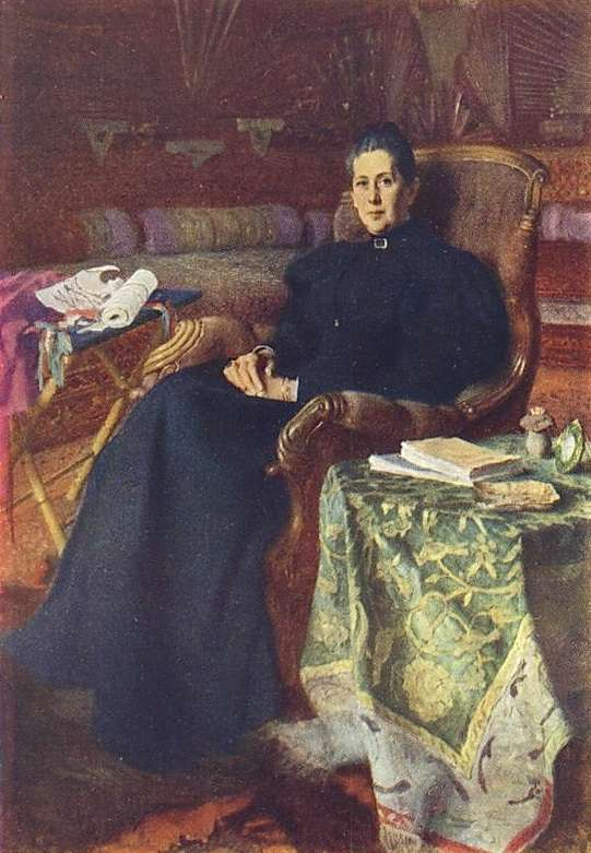 Портрет Е.П. Шереметевой. рожд. Вяземской. 1898 ГТГ